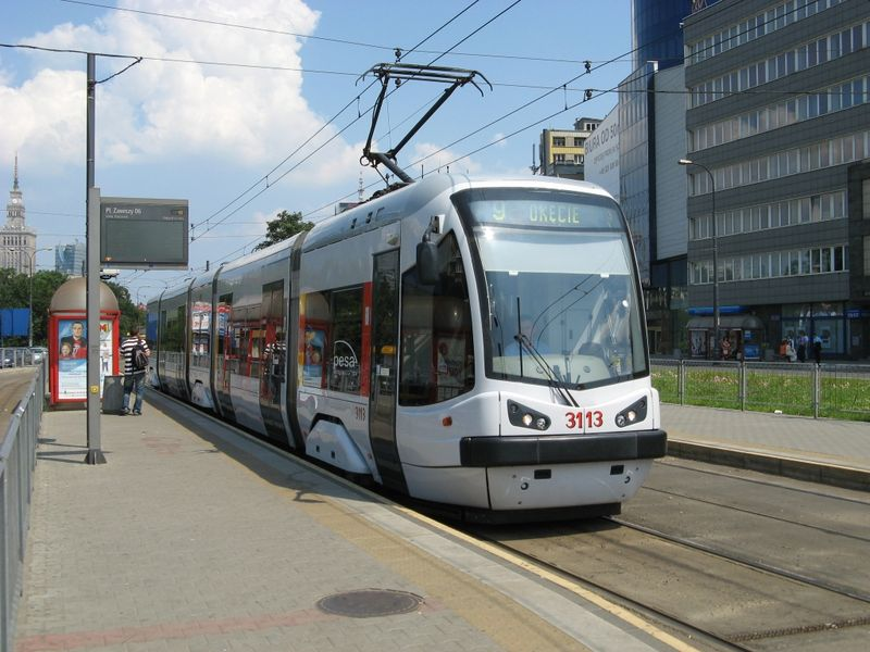 Tramwaj Pesa 120N (#3113) w Warszawie.